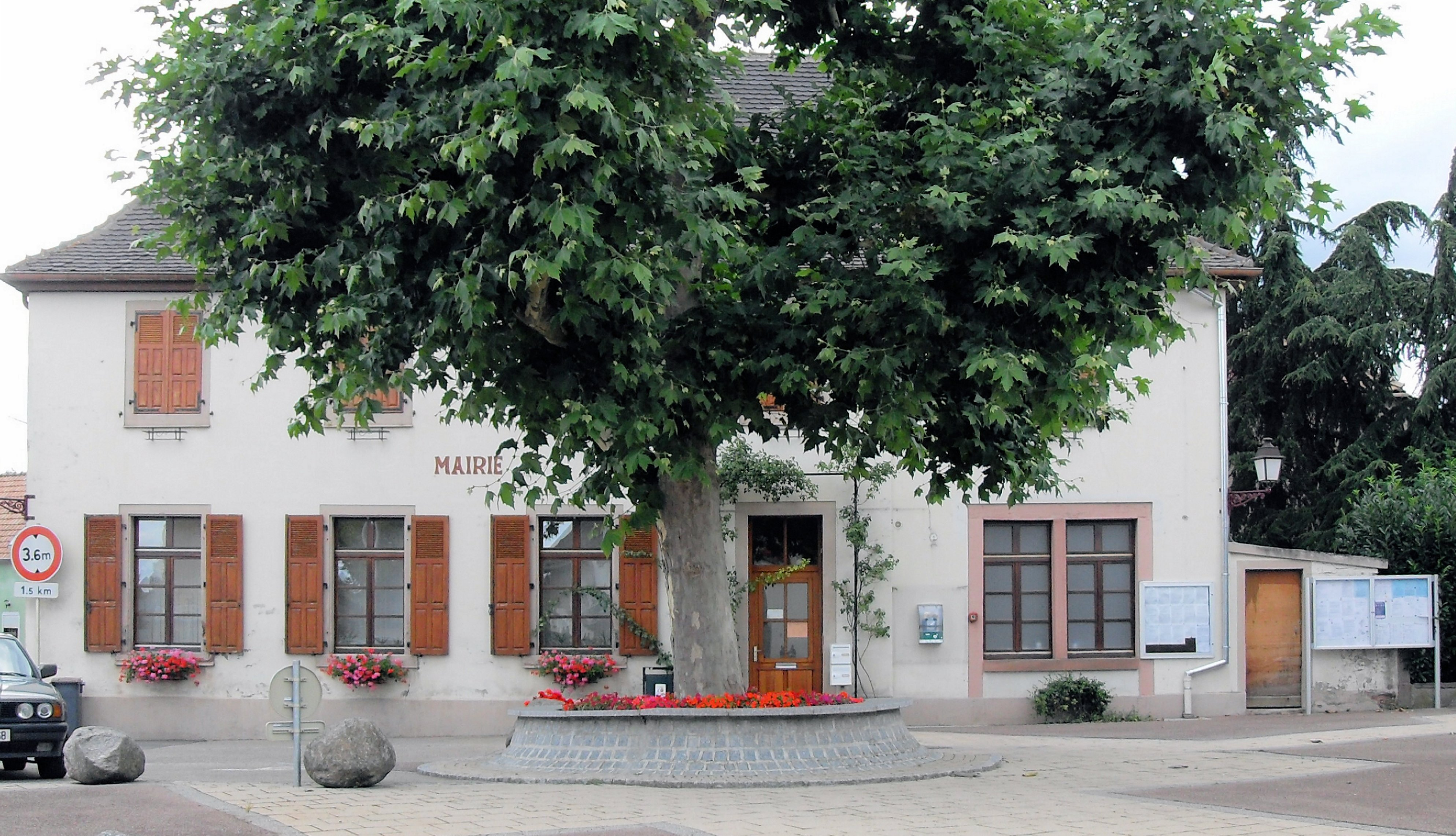 La mairie de Feldkirch